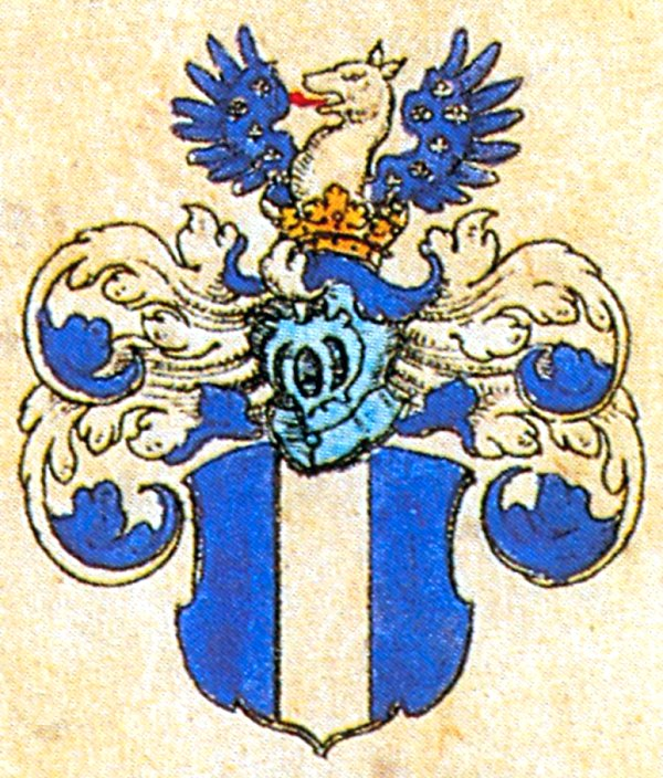 Stammwappen derer von der Leyen